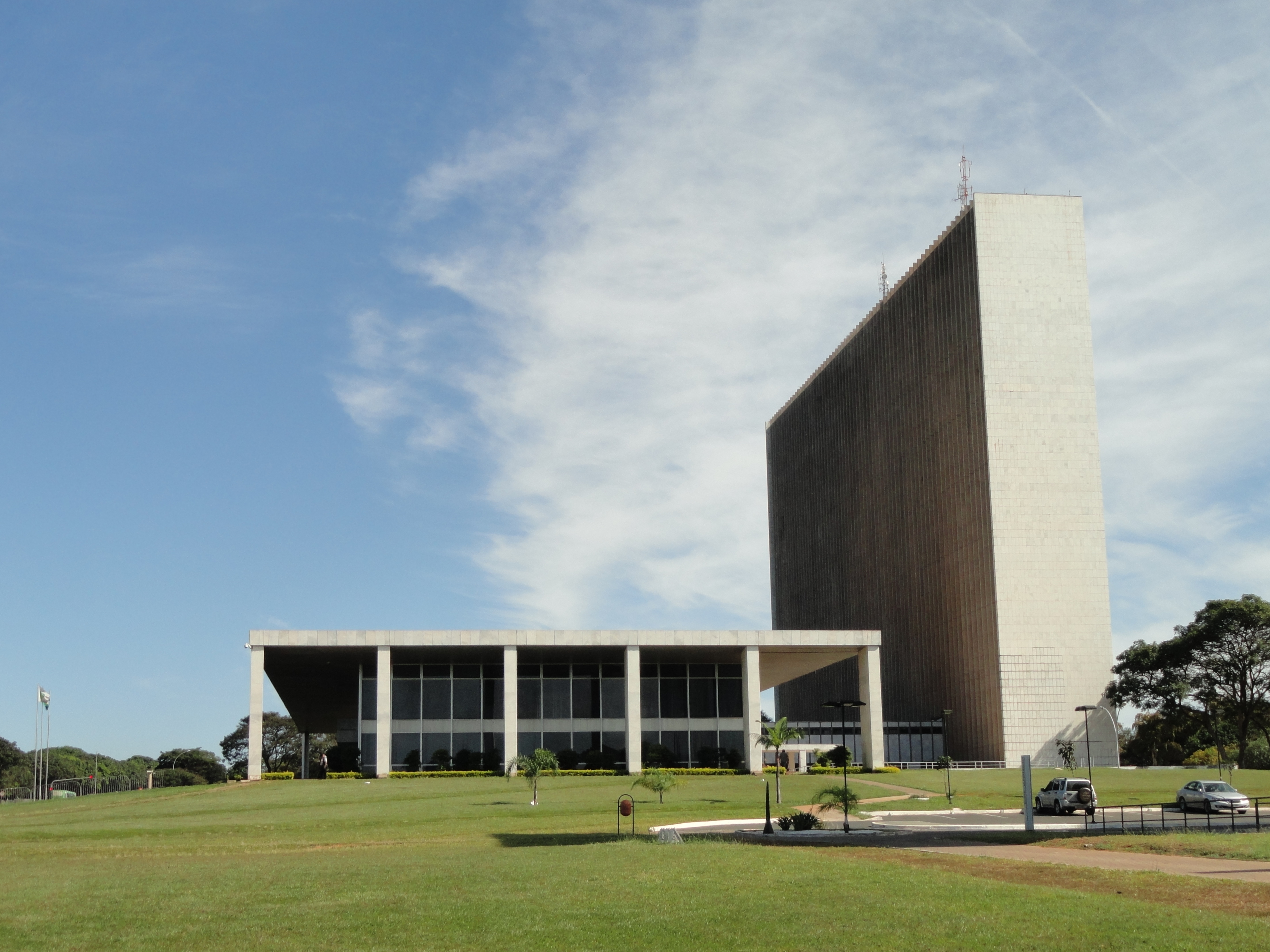 Vista lateral do Palácio do Buriti em Brasília, Sede do Governo do Distrito Federal, Brasil.